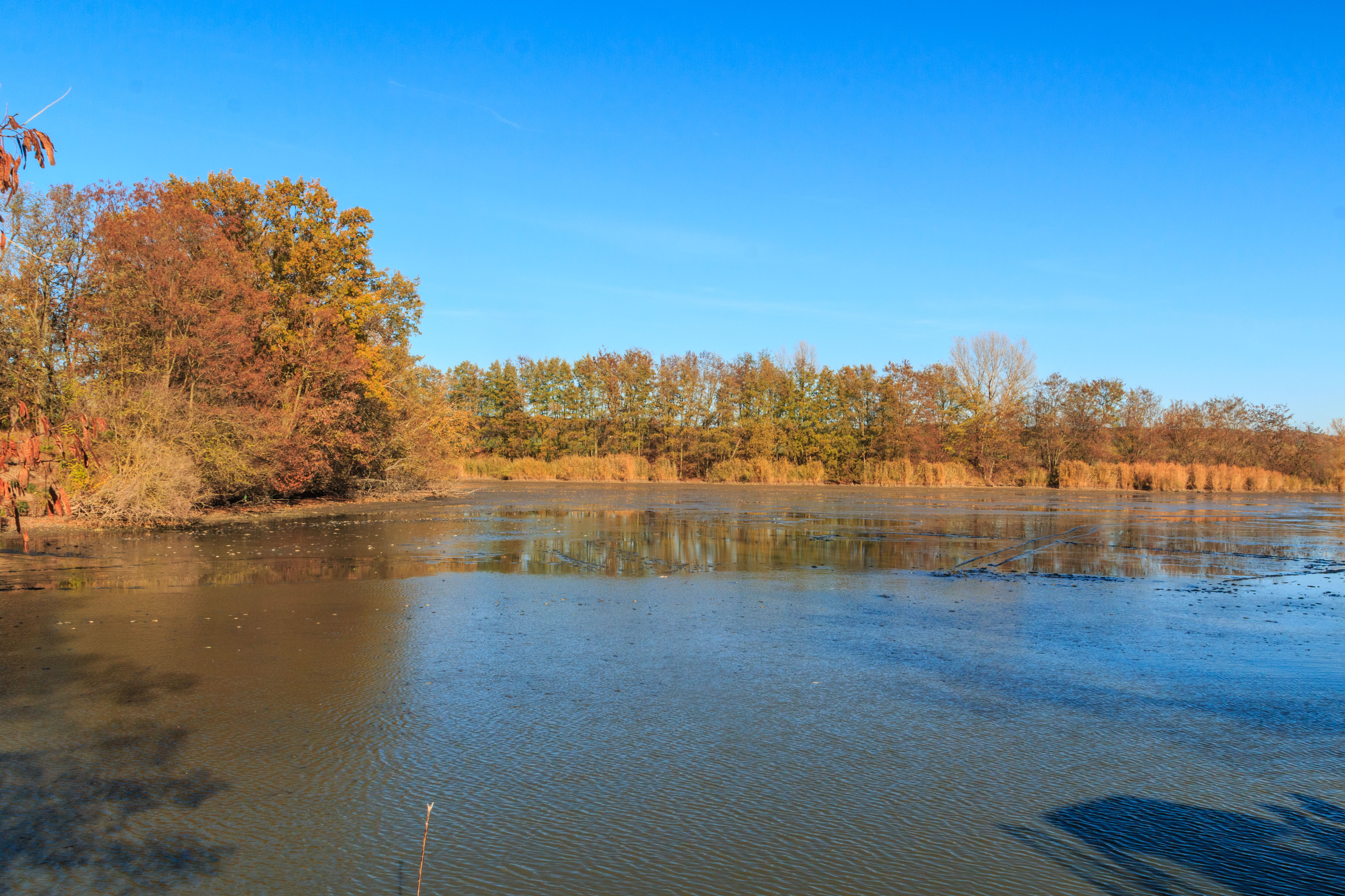 Rybník Stejskal u Libáně